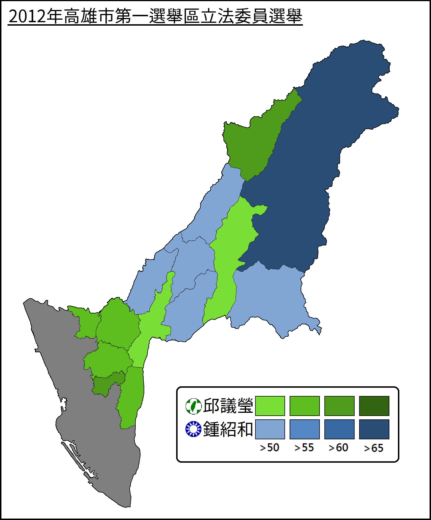 2012年高雄市第一選舉區立法委員選舉得票